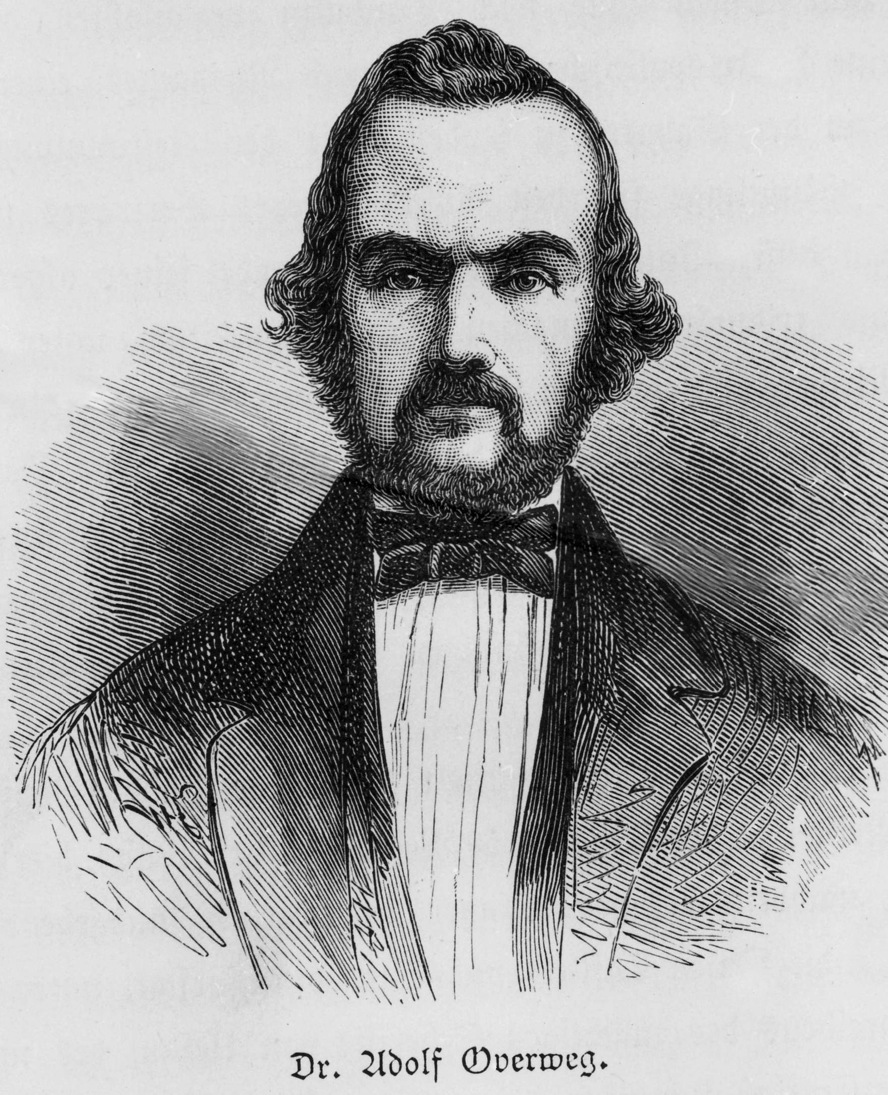 Porträt von Adolf Overweg